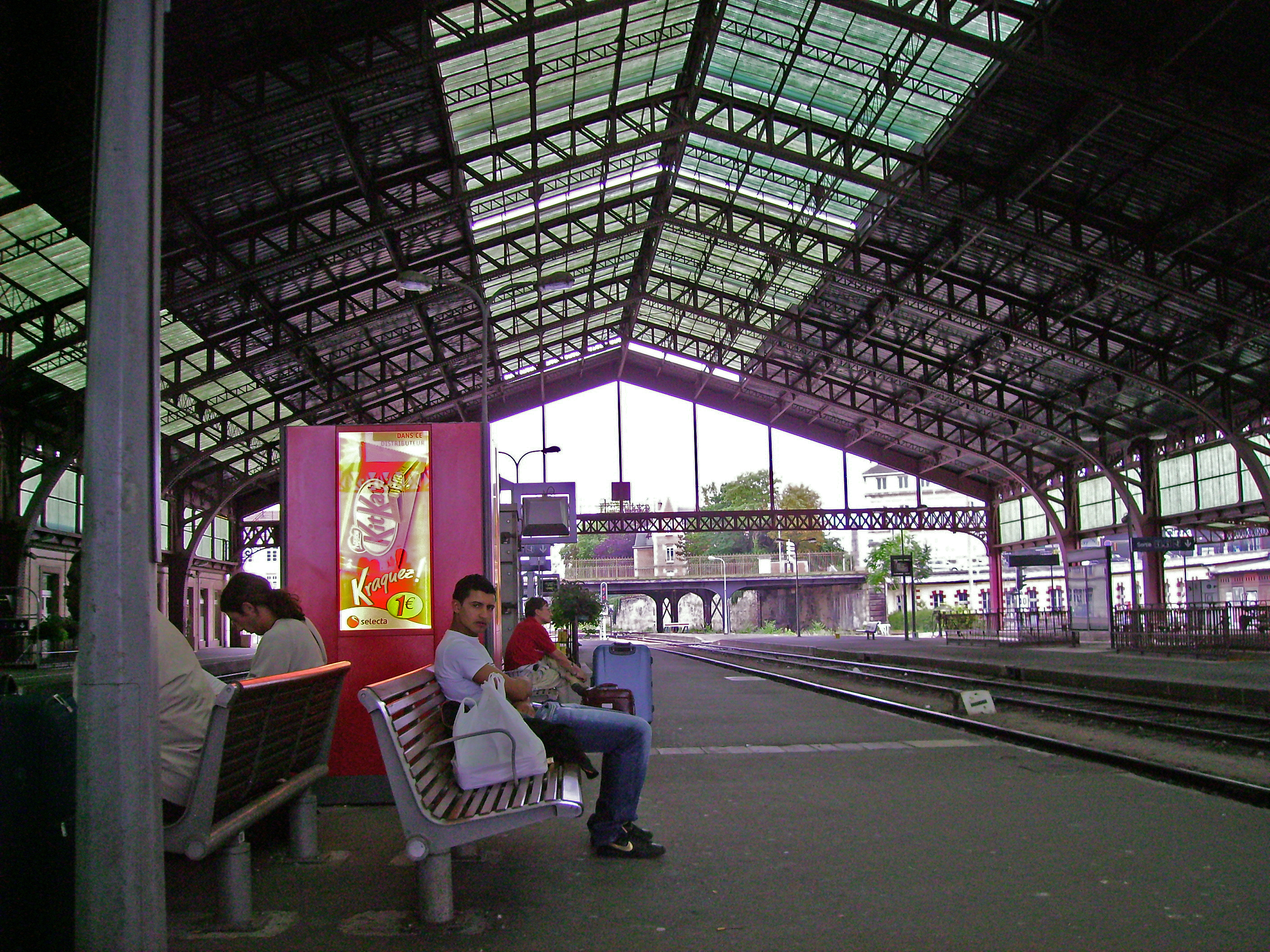 Les 3 voies de la gare de Troyes.